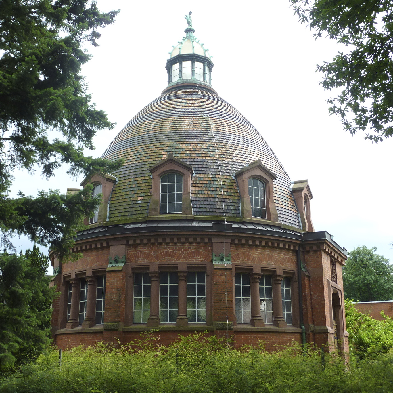 Stadt Frankfurt am Main: Das Wasserwerk Hinkelstein ist ein Trinkwasser-Pumpwerk im äußersten Westen des Frankfurter Stadtwaldes auf der Gemarkung des Stadtteils Schwanheim. Das Foto zeigt den 1894 eingeweihten, unter Denkmalschutz stehenden Backstein-Kuppelbau über dem Pumpwerk, Ansicht von Norden